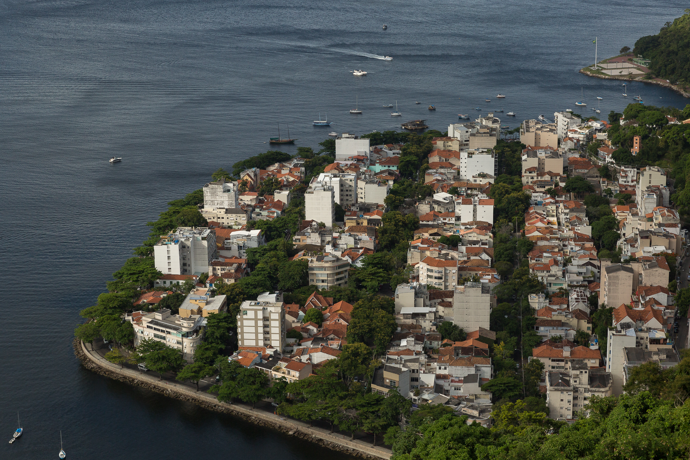 Vista aérea do bairro da Urca, localizado na cidade do Rio de Janeiro.